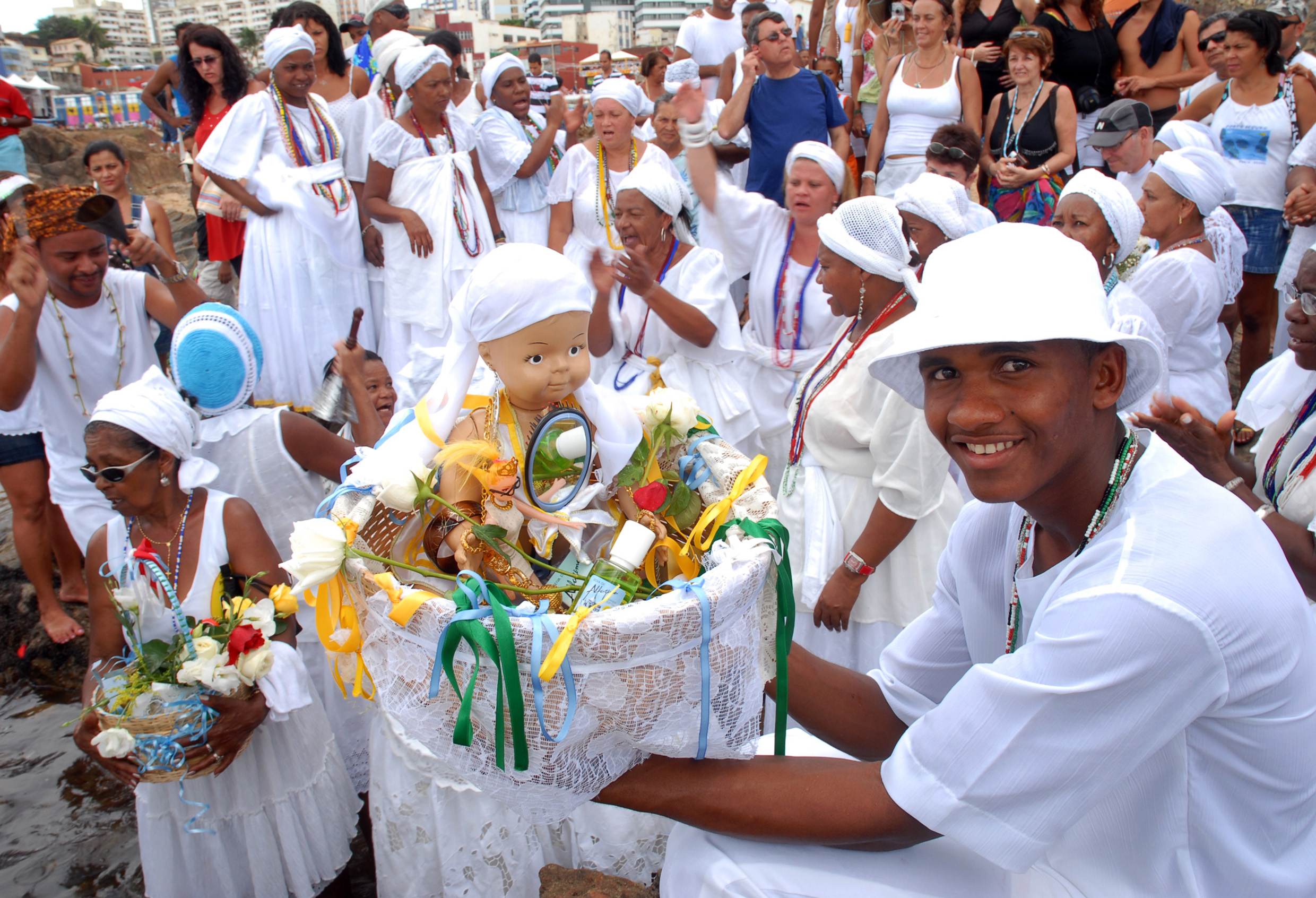 Presente de Iemanjá na Praia do Rio Vermelho, Salvador, Bahia, Brazil